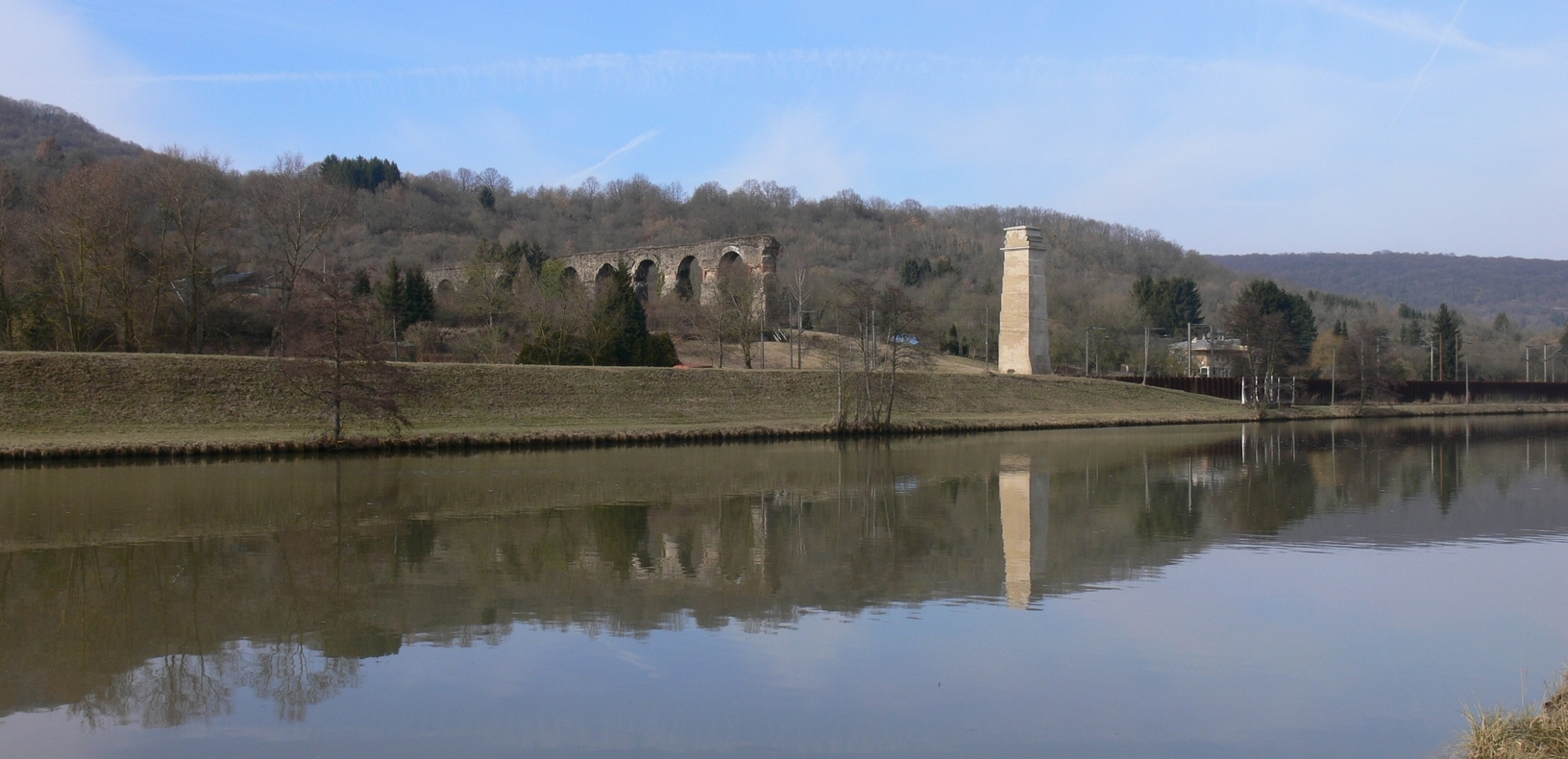 Aqueduc de Gorze à Metz (Lorraine) - section aérienne à Ars-sur-Moselle